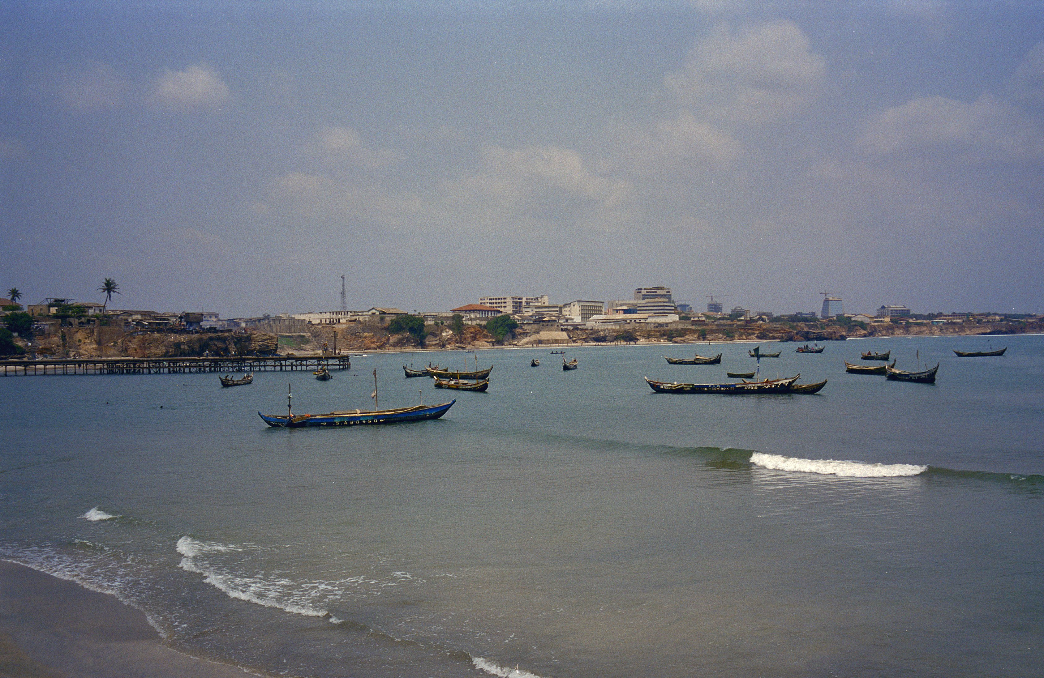 Overzicht baai met boten in de zee (opmerking: Ghana reis Loek Tangel)